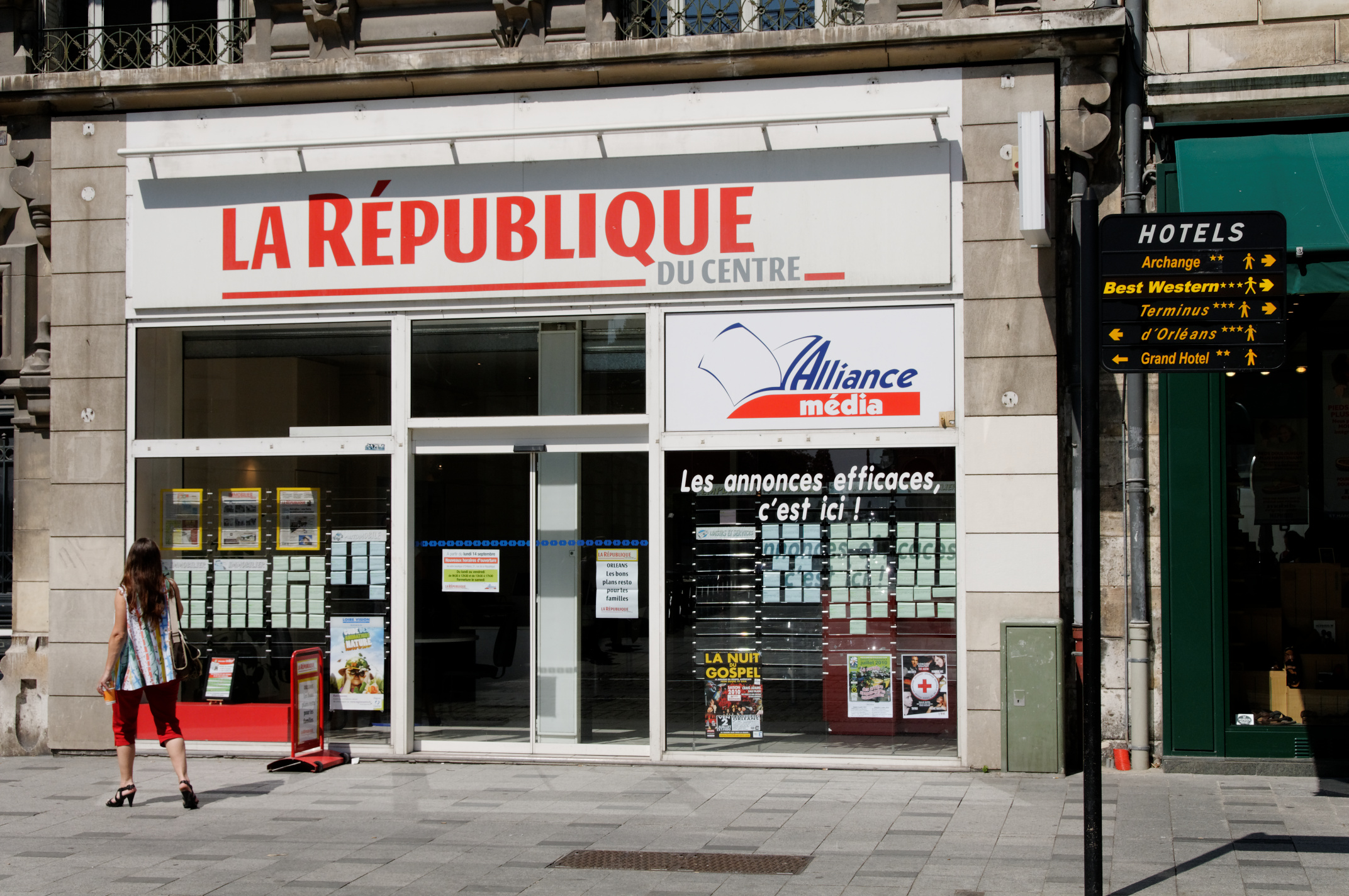 Siège de la rédaction orléanaise du journal régional La République du Centre, 31 rue de la République, Orléans, Loiret, France